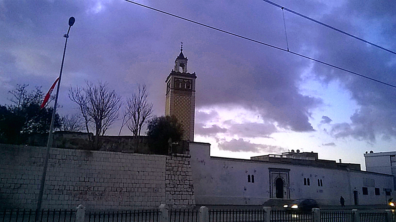 Bab Laassal , la médina de Tunis , Tunis باب العسل , مدينة تونس العتيقة , تونس